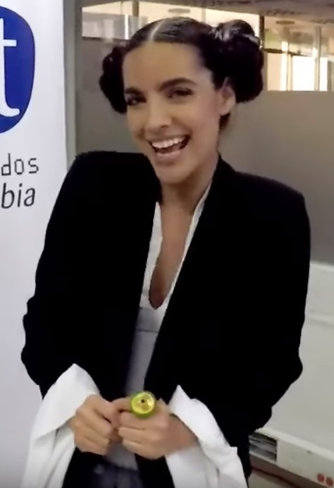 Disfruta yo soy Yo soy Franky con María Gabriela de Faría en Alta Definición a través de la señal #TDT. #LosMásBellos